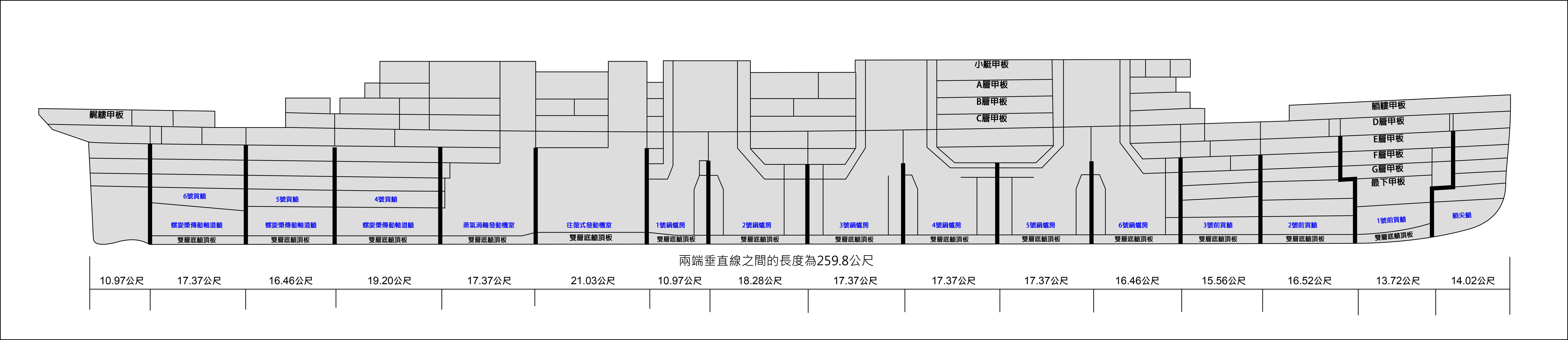 鐵達尼號的右舷簡易結構圖。甲板名稱以黑色字樣標記，防水艙室以藍色字樣標記。Based on sources like Beveridge, Bruce (2008). Titanic - The Ship Magnificient (Volume 1). Stroud: The History Press. ISBN 9780752446066.